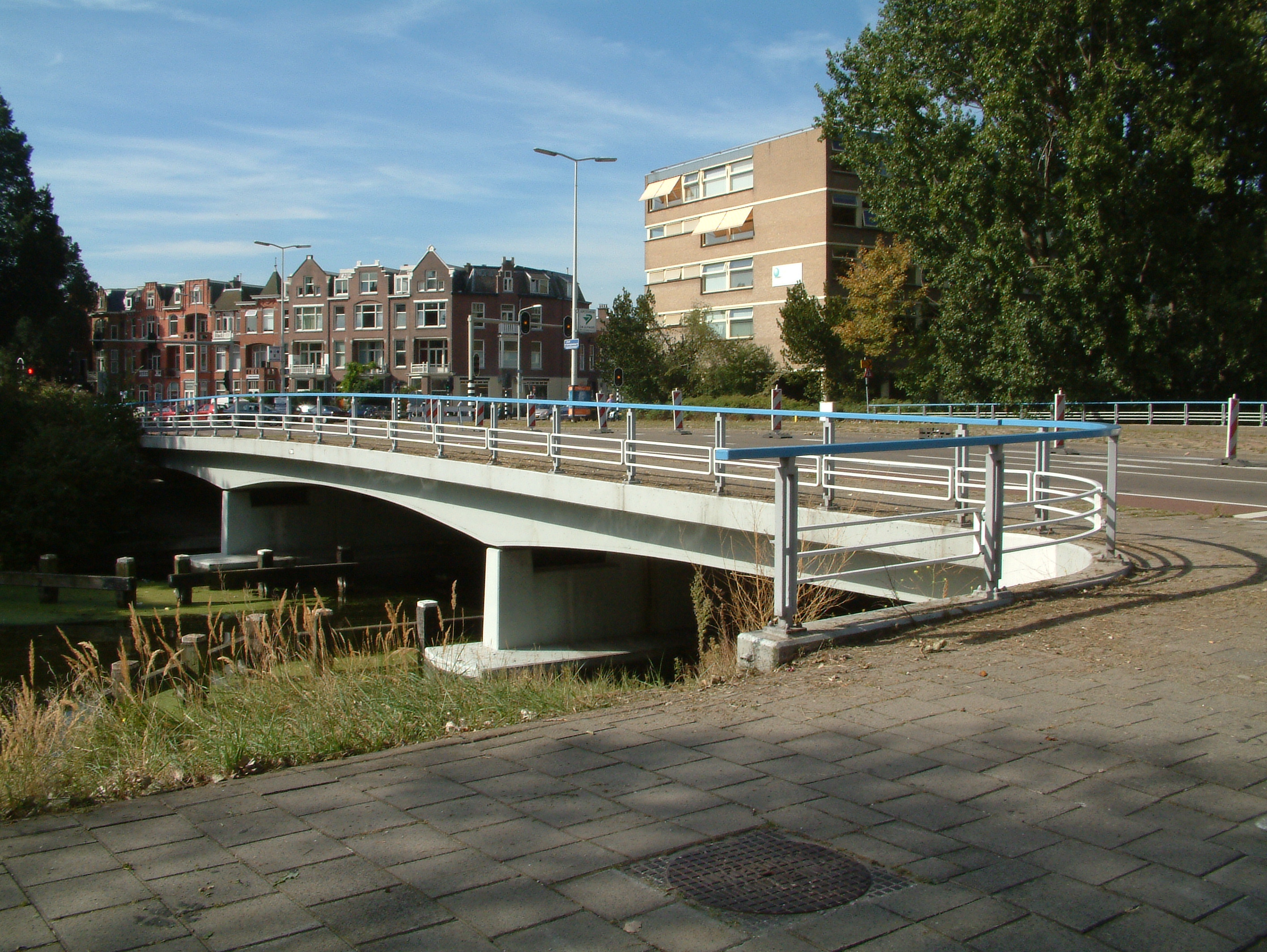 Brug in Den Haag